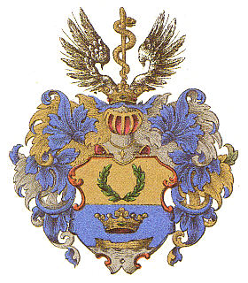 Vaakuna